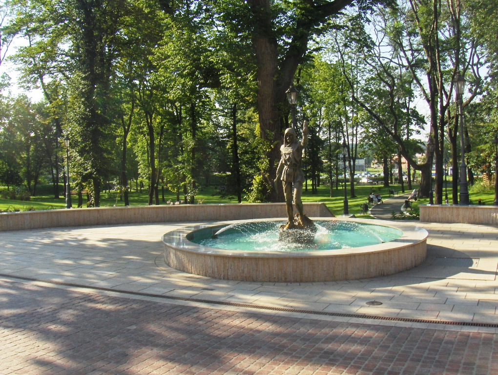 Park św.Kingi